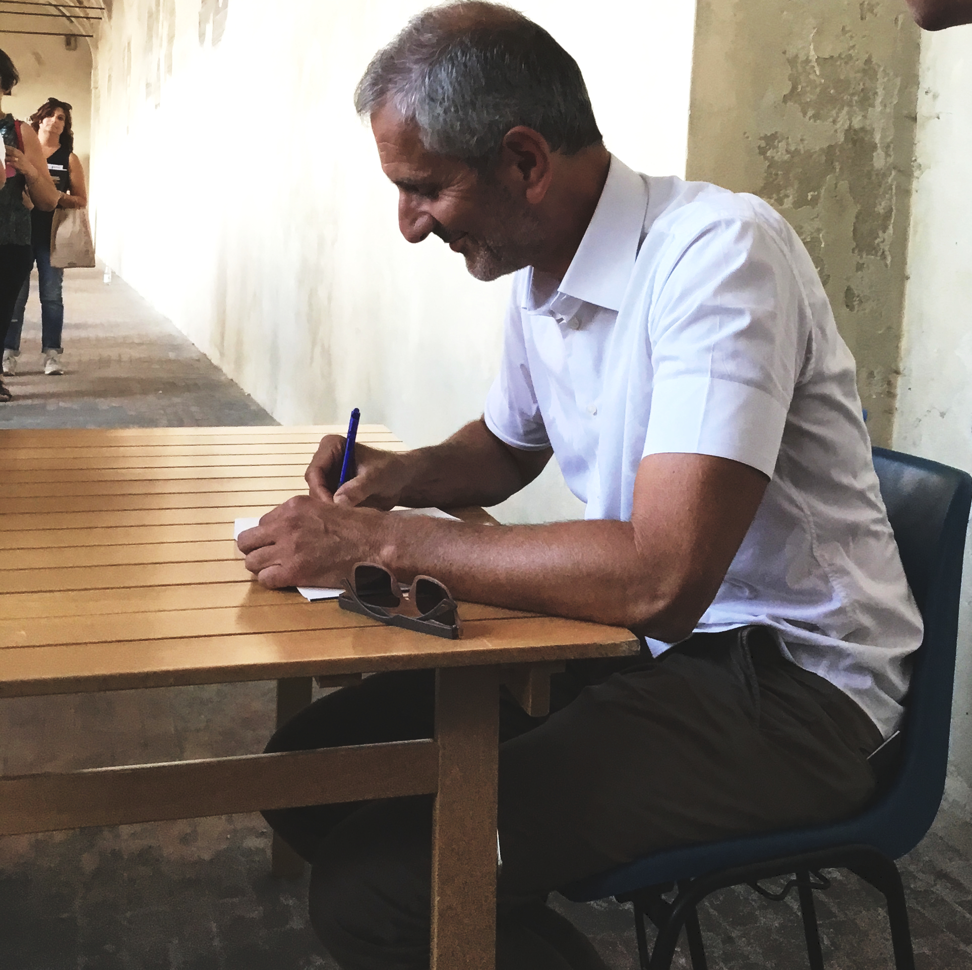 Gianrico Carofiglio autografa i suoi libri dopo un intervento al Festivaletteratura 2018 in piazza Castello. L'evento si è svolto il pomeriggio dell'8 settembre.